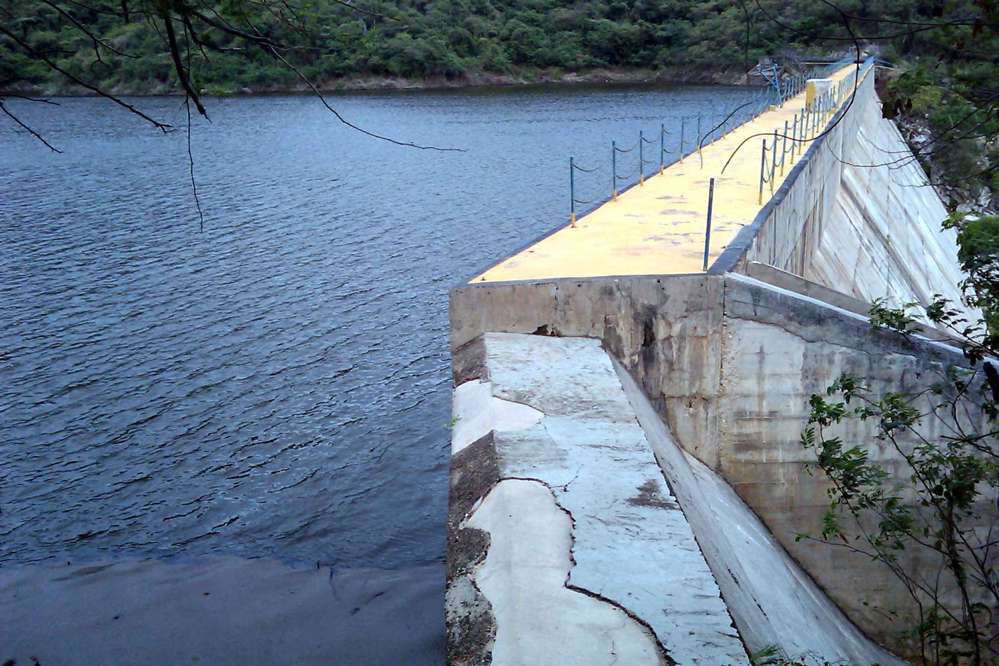 Dique de San Juan Bautísta